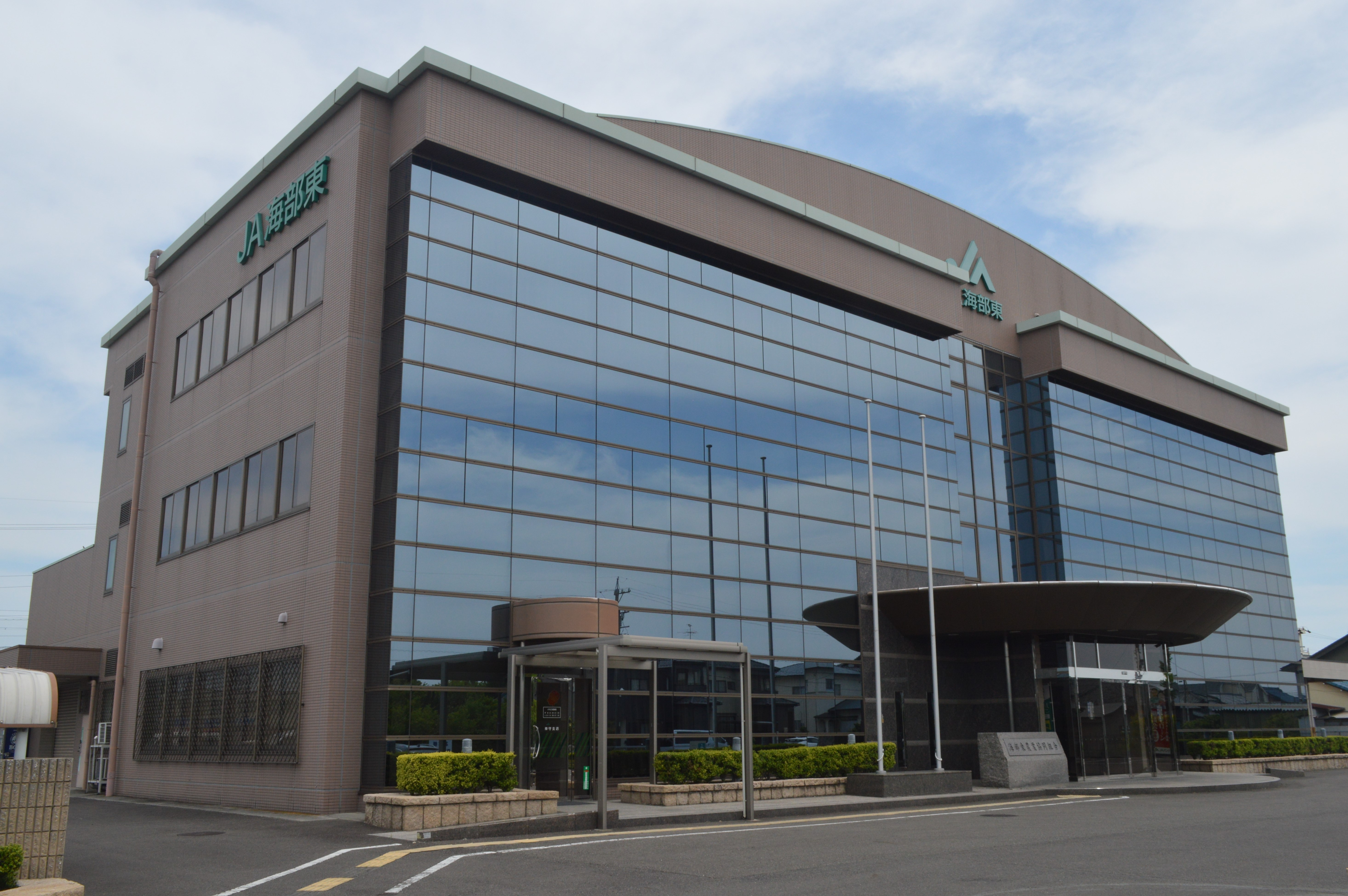 愛知県津島市にある海部東農業協同組合（JA海部東）本店。